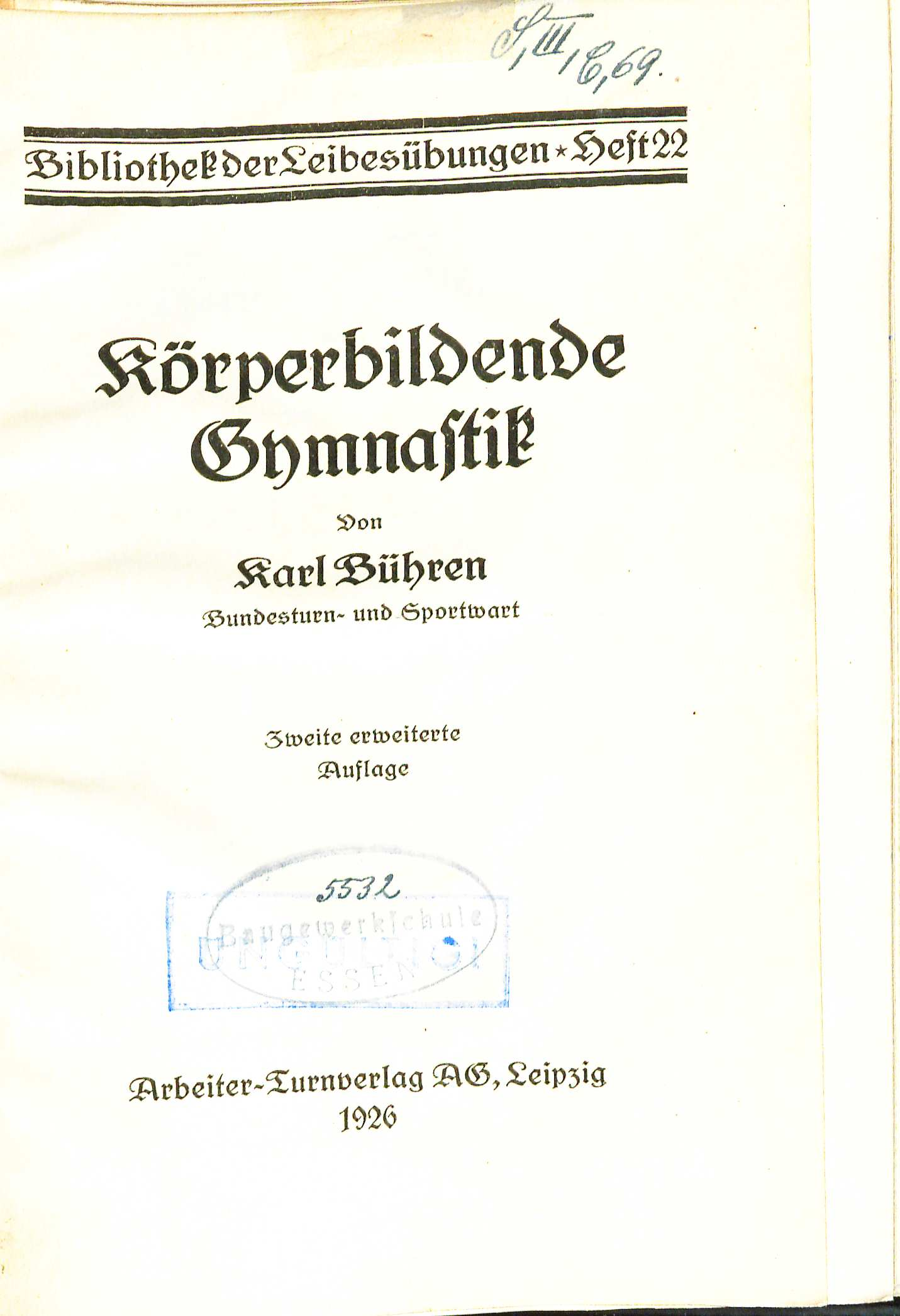 Karl Bühren Körperbildende Gymnastik. Leipzig : Arbeiter-Turnverlag, 1924, Zweite Auflage 1926